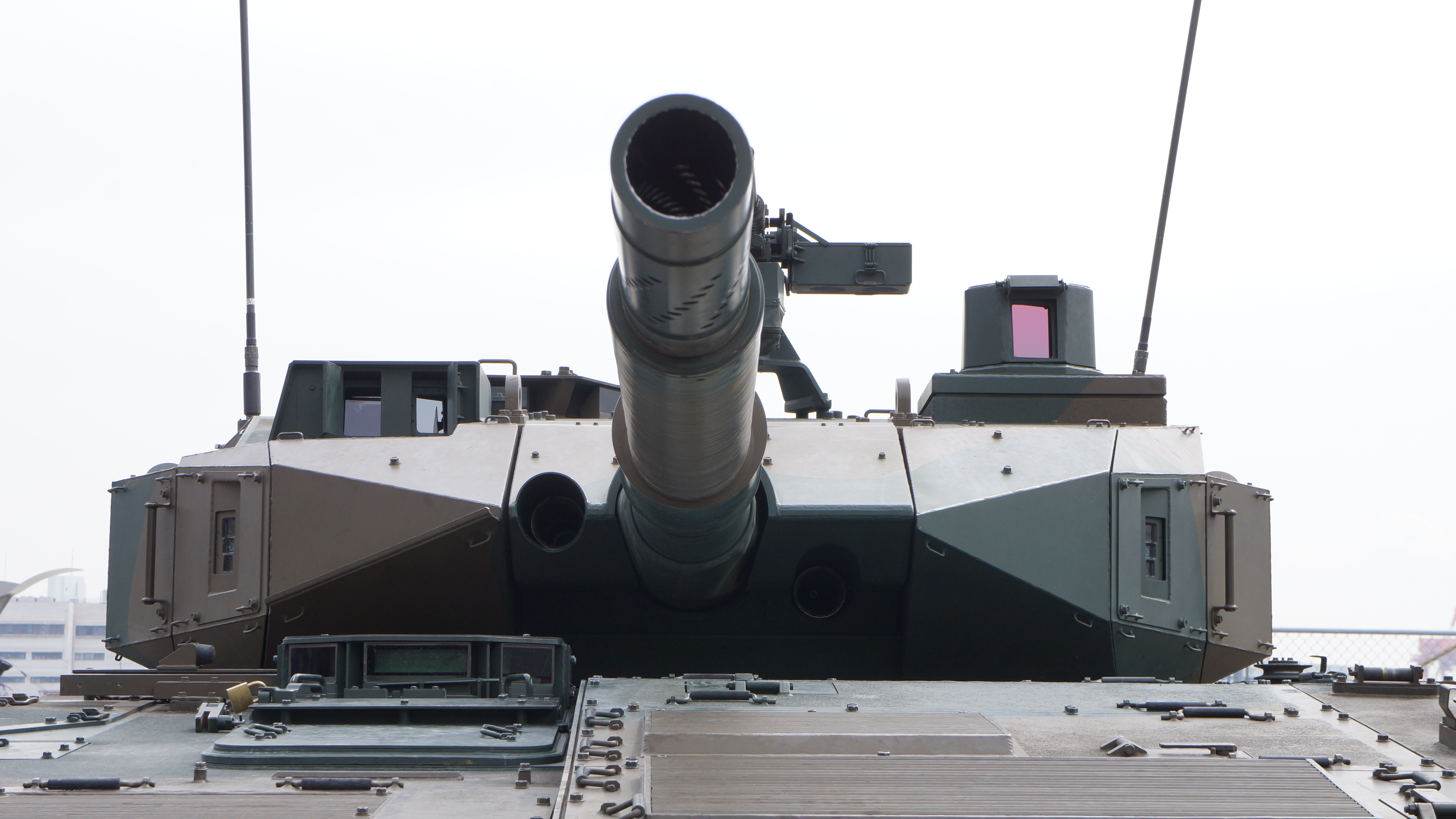 陸上自衛隊 16式機動戦闘車（試作車、99-0300号車） 砲塔 正面。2017年3月5日 大阪南港ATCにて開催されたOSAKA防衛防災フェスティバル2017にて。